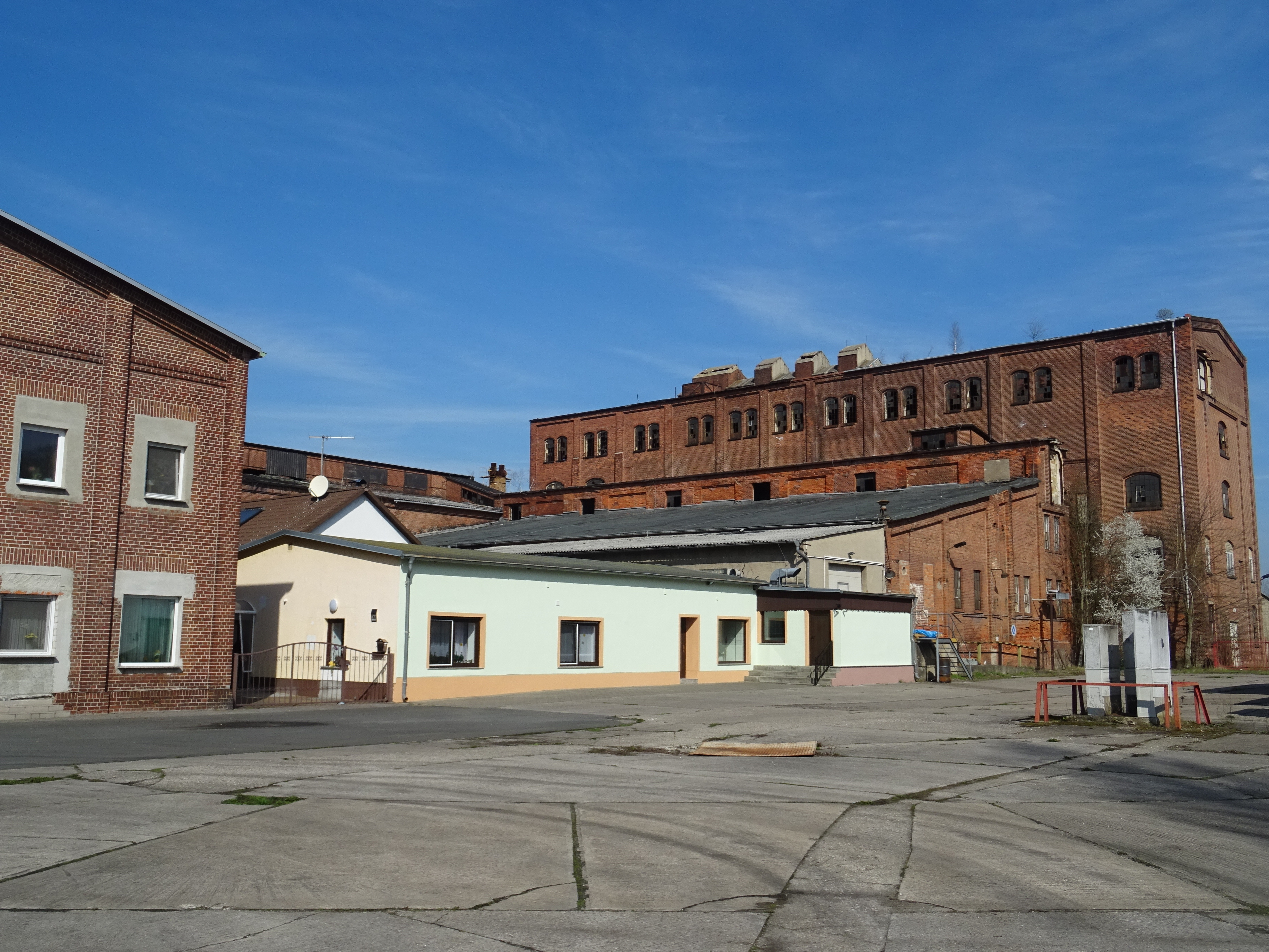 Bergwitz, Brikettfabrik, Hof